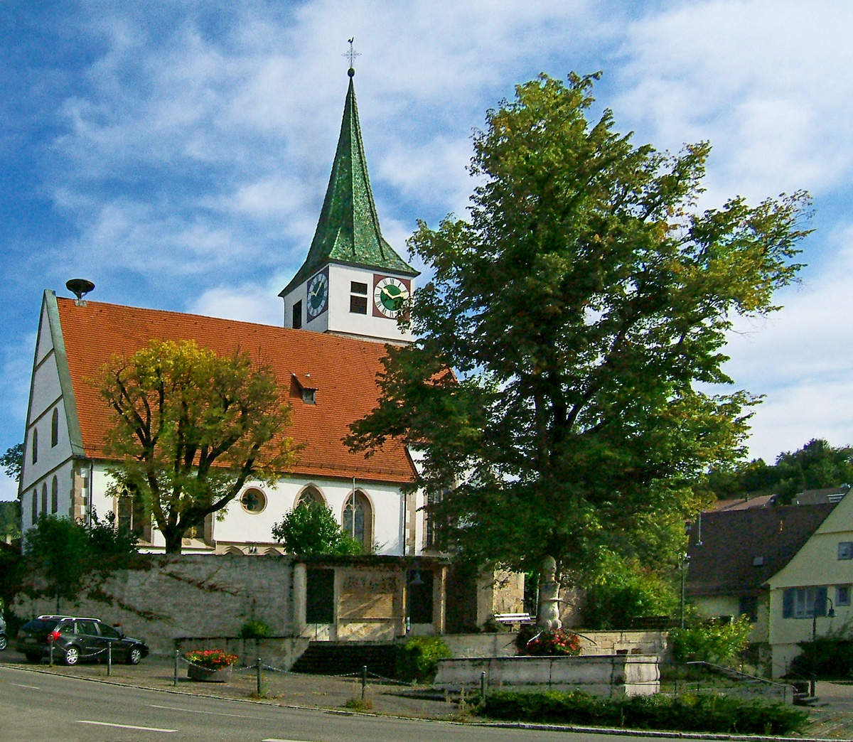 Dionysiuskirche in Remshalden-Grunbach, Deutschland; rechts vorne der Brunnen